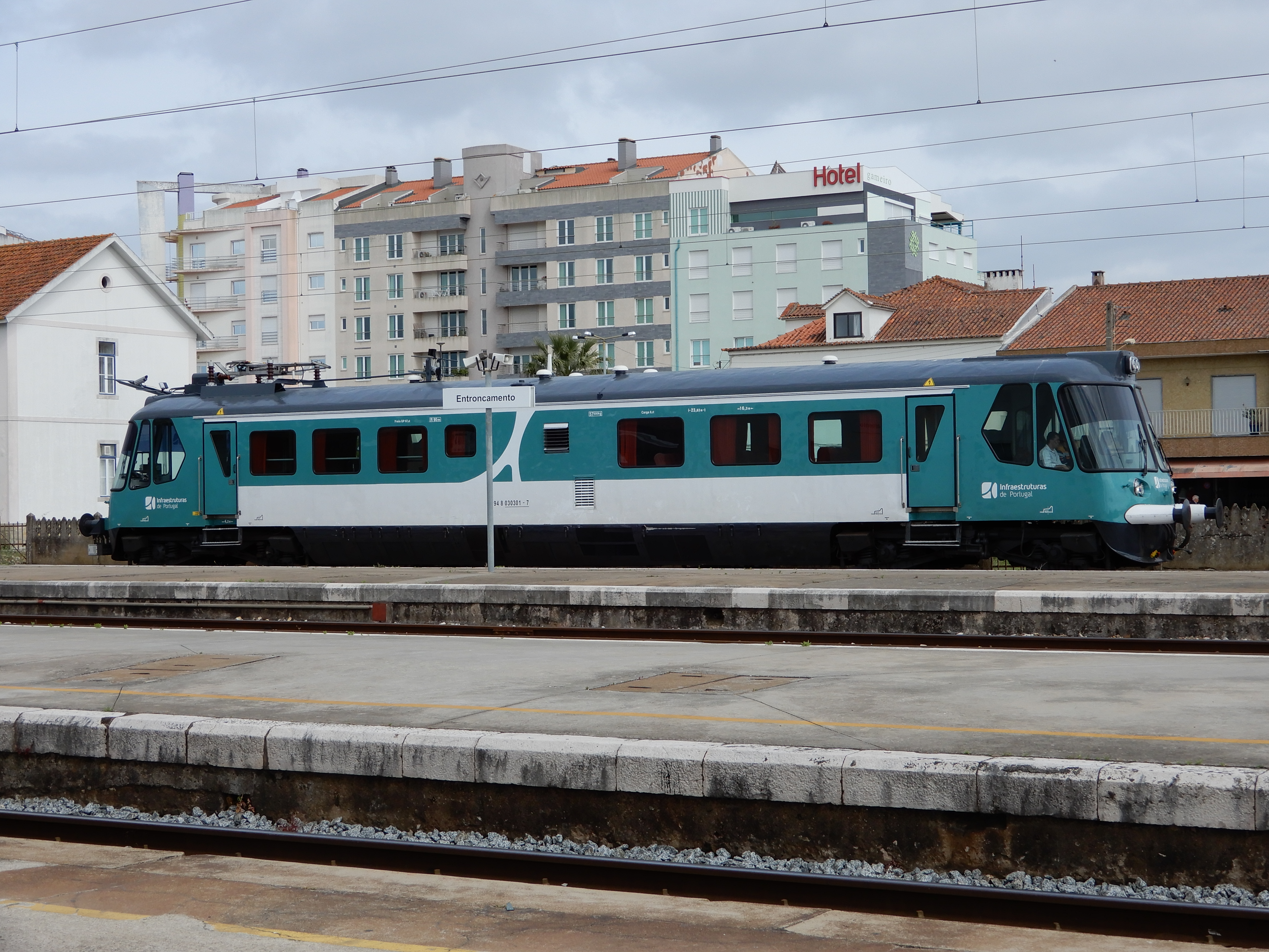 Unidade 0301 da série 0300 das Infraestruturas de Portugal, usada na inspecção de catenária com um pantógrafo instalado, parada na Estação Ferroviária do Entroncamento.